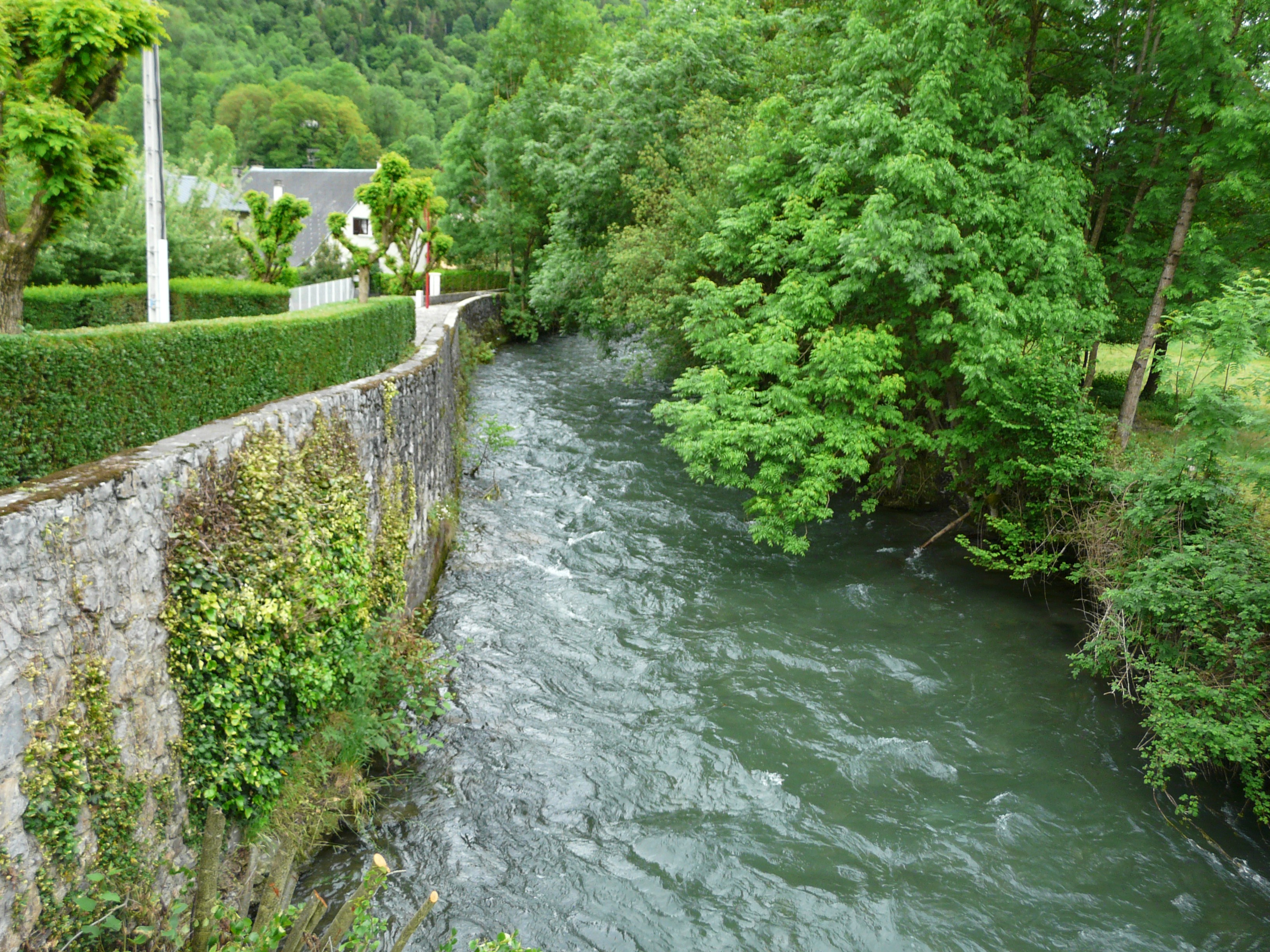 La Pique en amont du pont de la route départementale 27b, en limites de Salles-et-Pratviel (à gauche) et Antignac (à droite), Haute-Garonne, France.